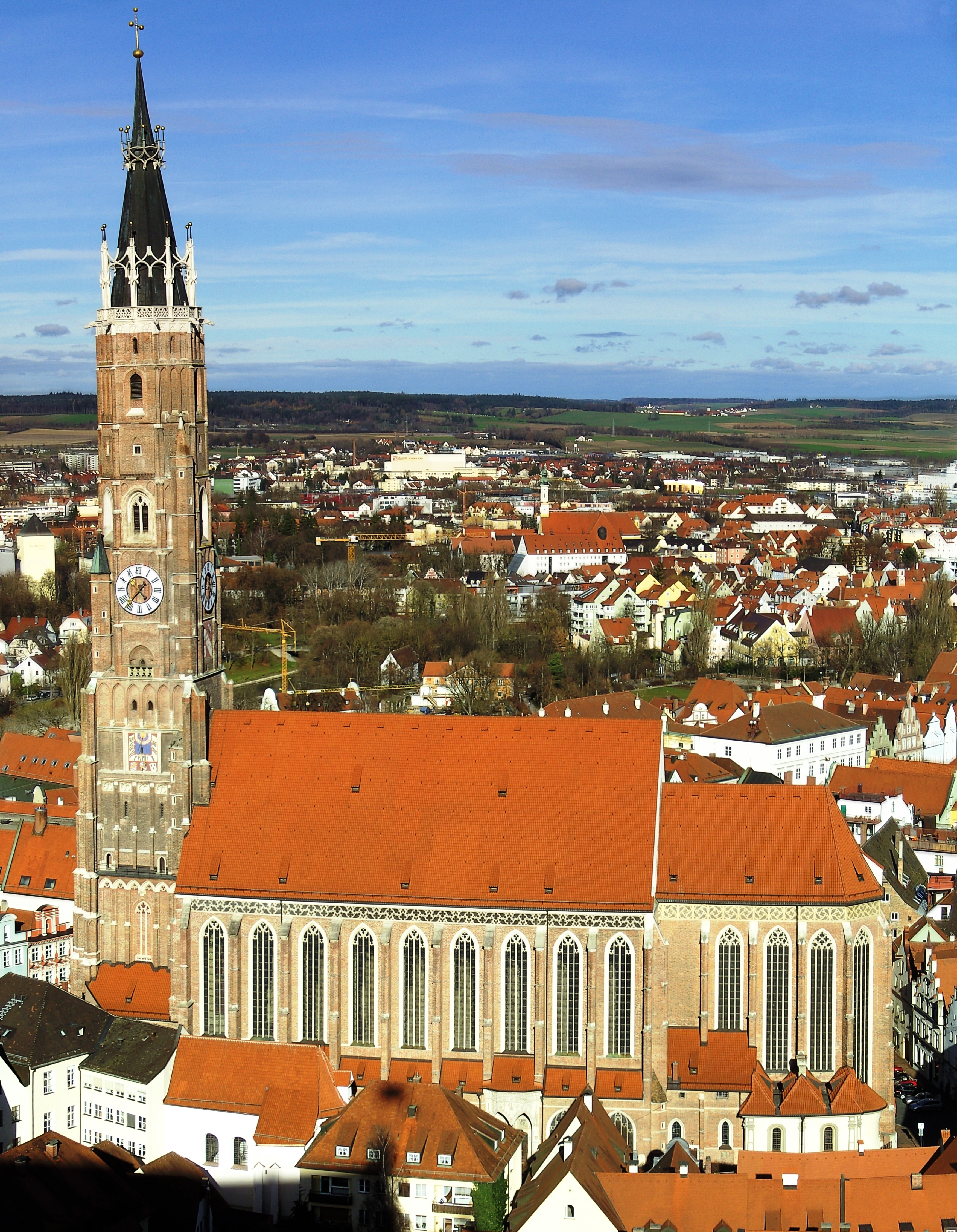 Die Stadtpfarr- und Kollegiatstiftskirche St. Martin und Kastulus in Landshut.